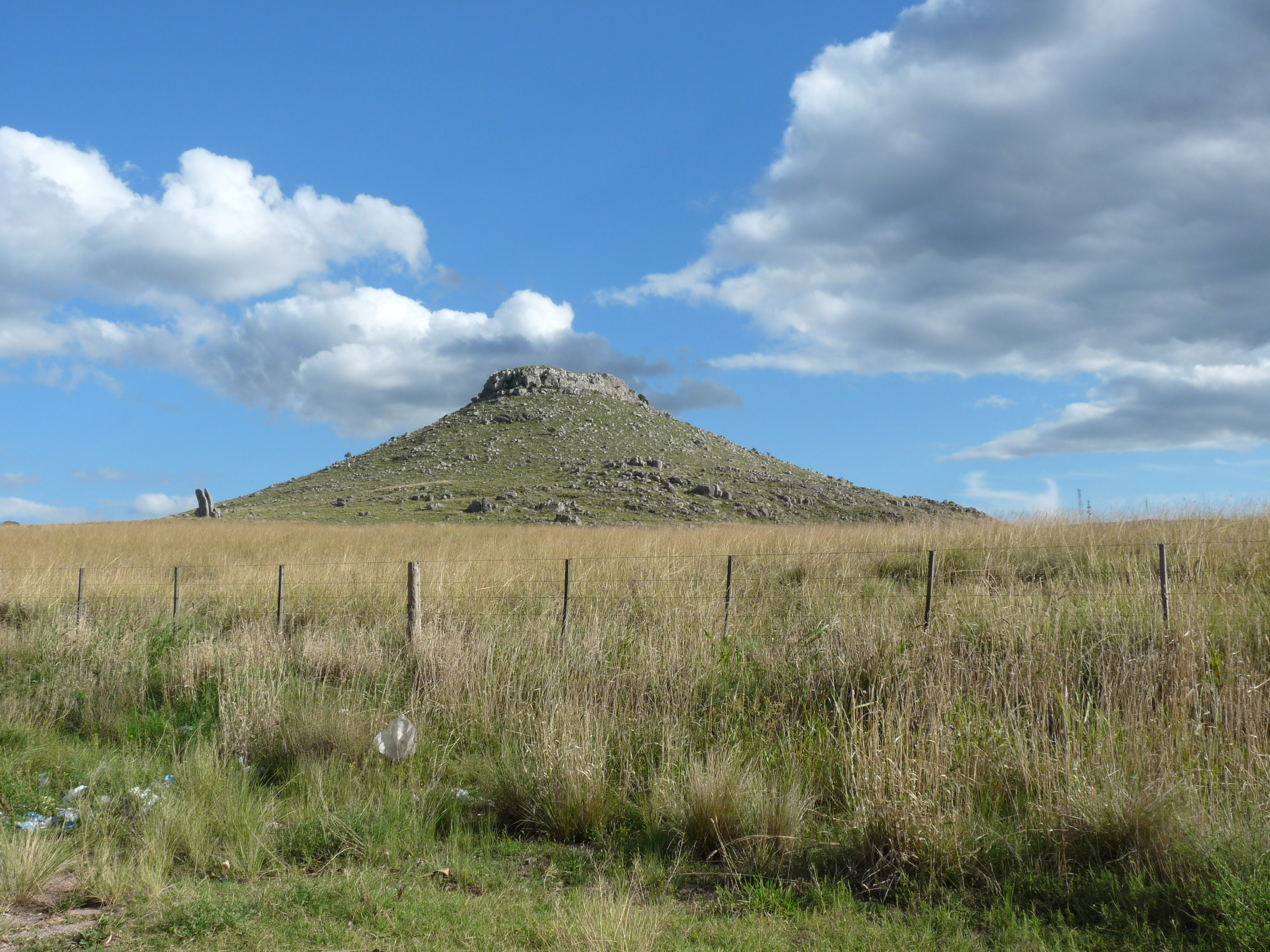 Cerro sombrerito 379 m.s.n.m.